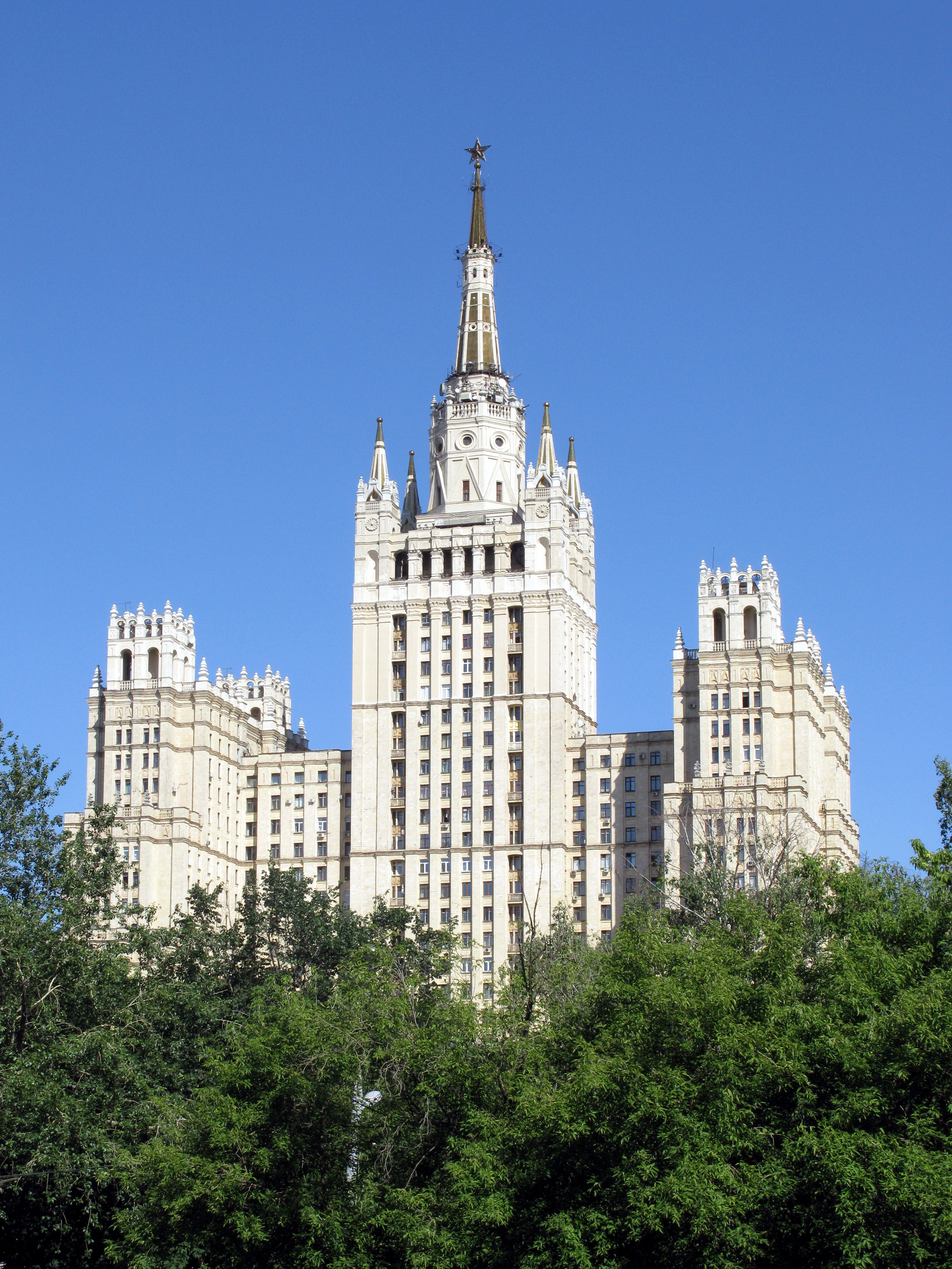 Жилой дом на Кудринской площади (Москва, Кудринская площадь, 1).